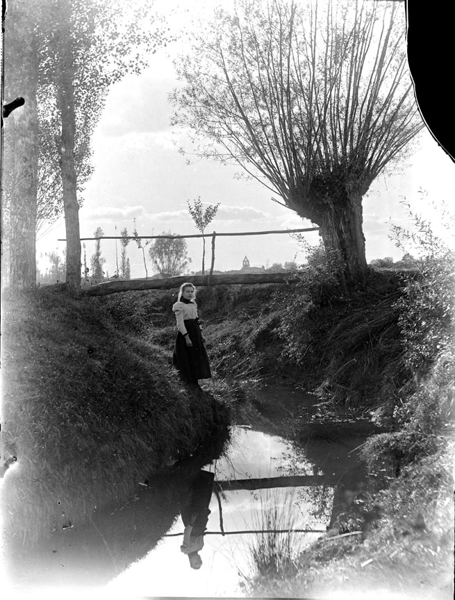 Fonds Trutat - Photographie ancienne Cote : PERB028_ Localisation : Fonds ancien (S 30) Original non communicable Titre : Hélène Perbosc posant sur les bords d'un ruisseau Auteur : Trutat, Eugène Rôle de l’auteur : Photographe Date de création : 1859-1910 [entre] Observations : Collection Antonin Perbosc. Mot(s)-clé(s) : -- Portrait -- Jeune fille -- En pied -- Rive -- Ruisseau -- Arbre -- Végétation -- Perbosc, Hélène -- 19e siècle, 2e moitié -- 20e siècle, 1e quart Médium : Photographies -- Noir et blanc -- Portraits Bibliothèque de Toulouse. Domaine public